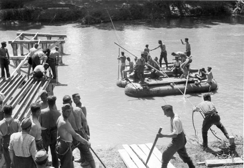 Bau einer Behelfsbrücke über den Sperchios, 5. Pz, Div. 23.04.41, Griechenland, 5 km südl. Lamia